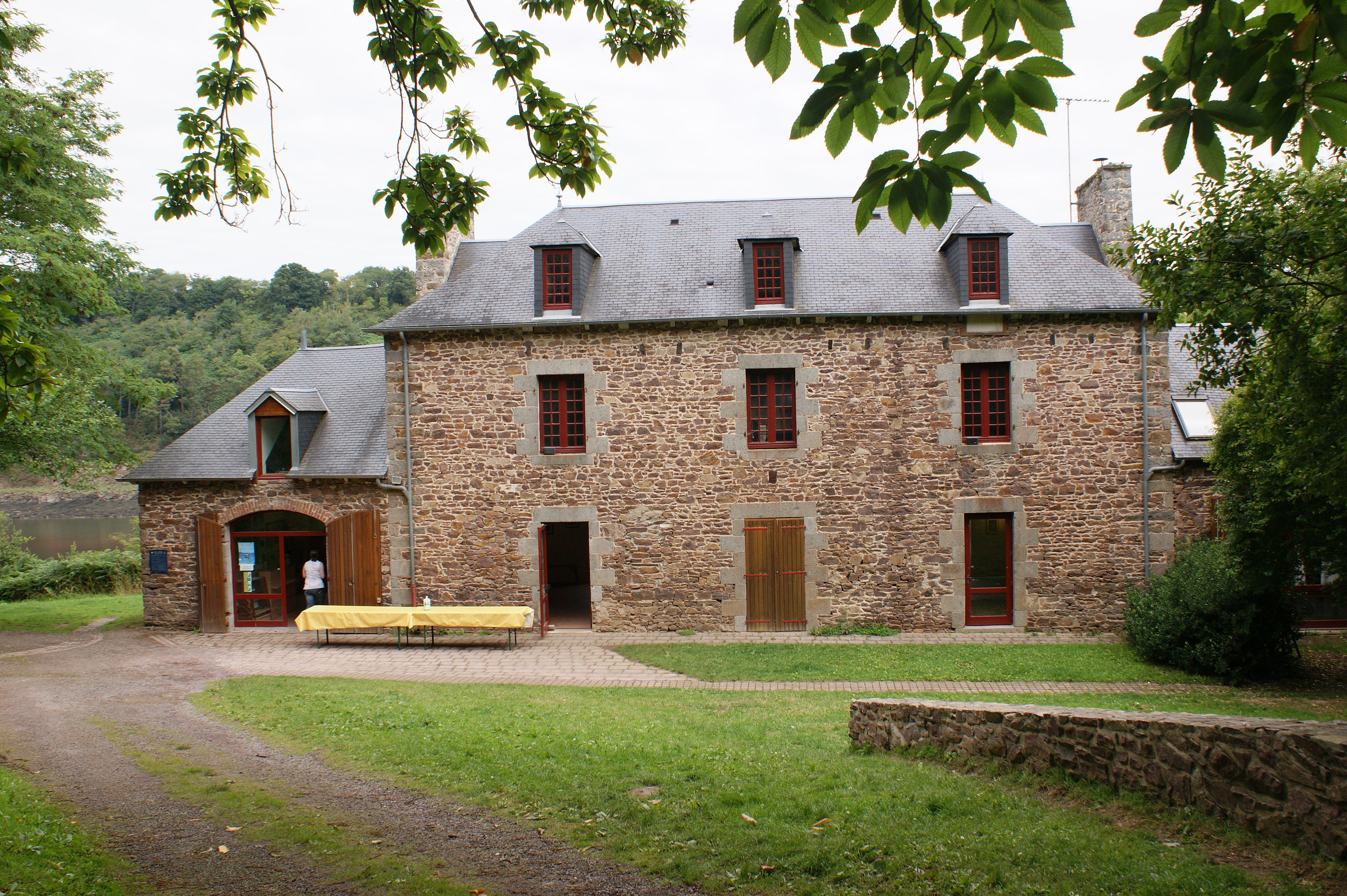 La maison de l'estuaire, situé dans l'ancien manoir de Traou-Nez à côté de la halte ferroviaire de Traou-Nez. Est utilisé par La Vapeur du Trieux comme halte.